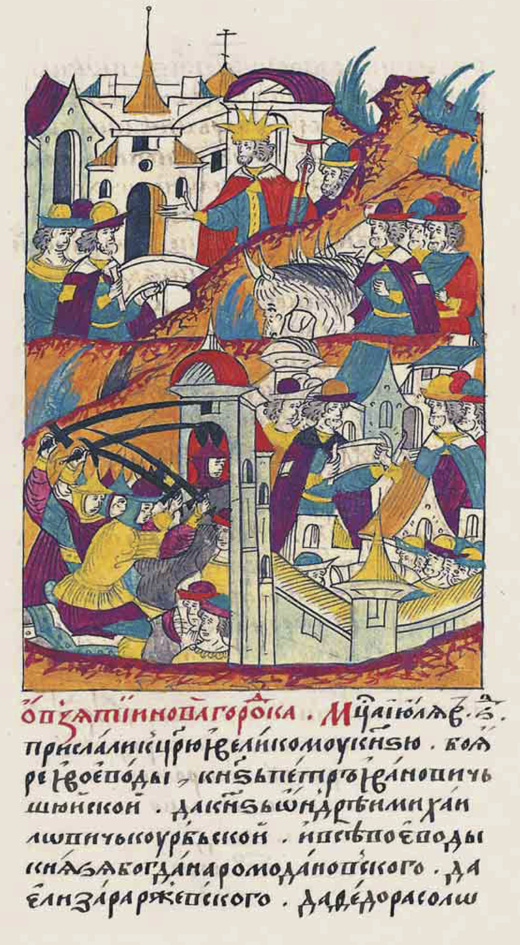 О взятии Новгородка. Месяца июля в 6 день прислали к царю и великому князю бояре и воеводы князь Петр Иванович Шуйский и князь Андрей Михайлович Курбский, и все воеводы князя Богдана Ромодановского и Елизара Ржевского и Федора Солов-[цова]